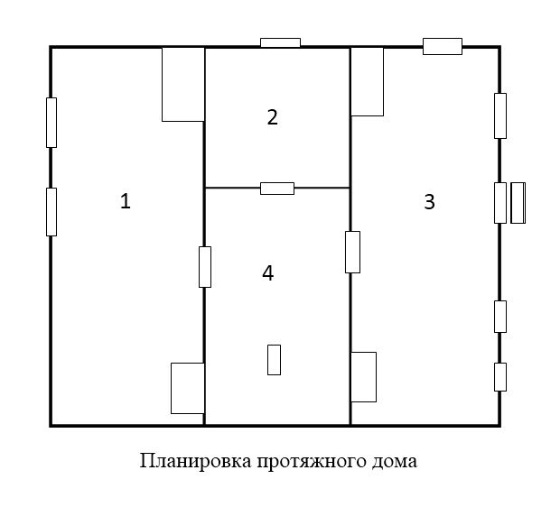 Казачья архитектура. Планировкапротяжного дома. По материалам ст. Н.С, Попова. Жилище Донских казаков в ареальном аспекте. Вестник ЮНЦ РАН т. 8 №2 2012г.